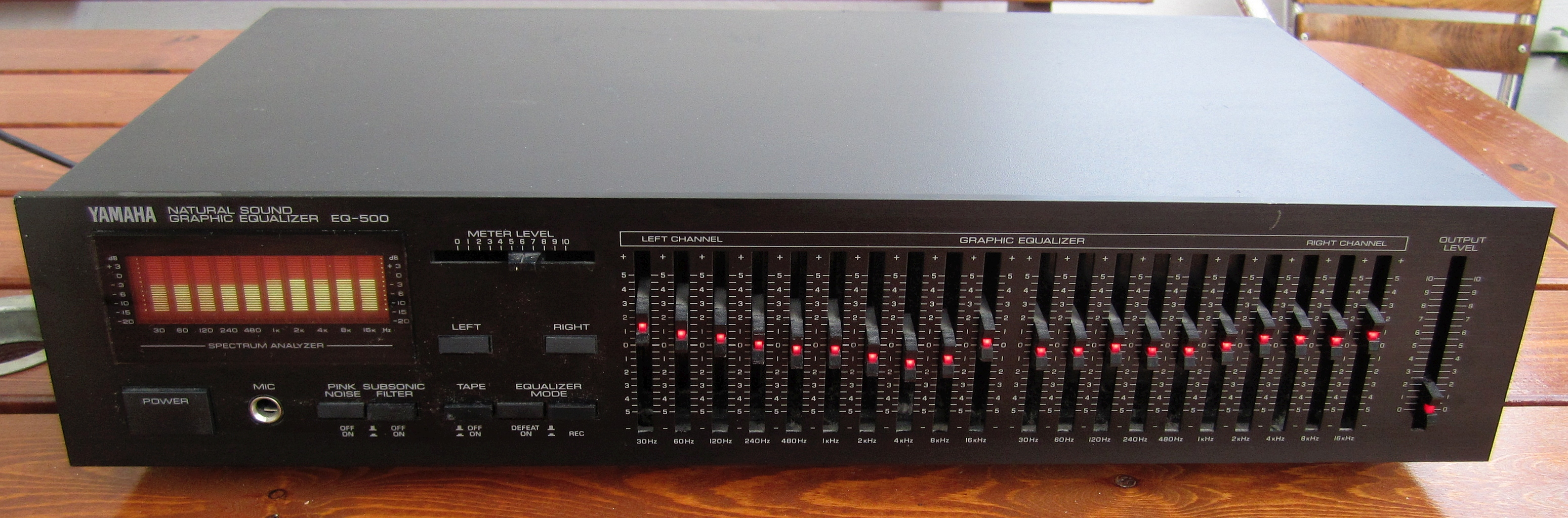 Yamaha EQ-500 Graphic Equalizer